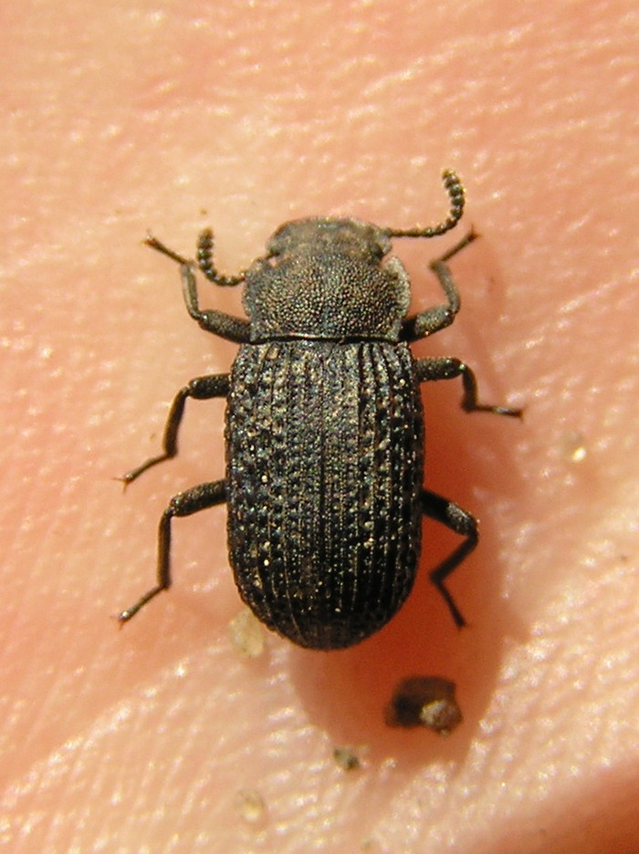 Bolitophagus reticulatus, Białowieża, Polska